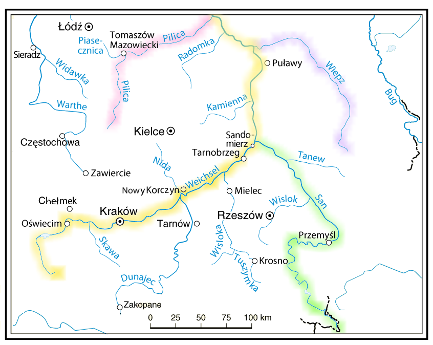 Weichsel-Becken Südlicher Teil